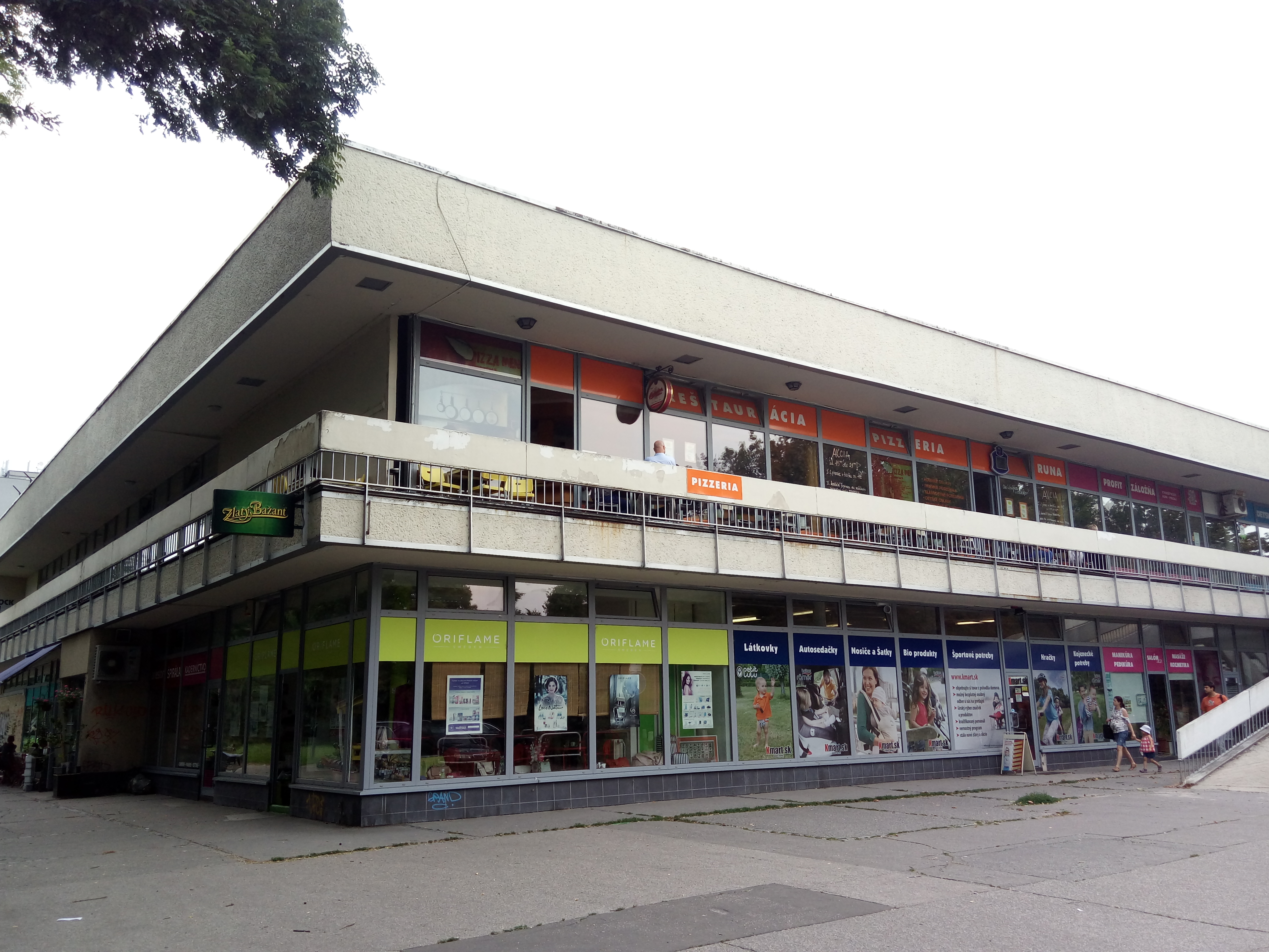 Dr. Vladimíra Clementisa 10, Ružinov-Ostredky, Bratislava